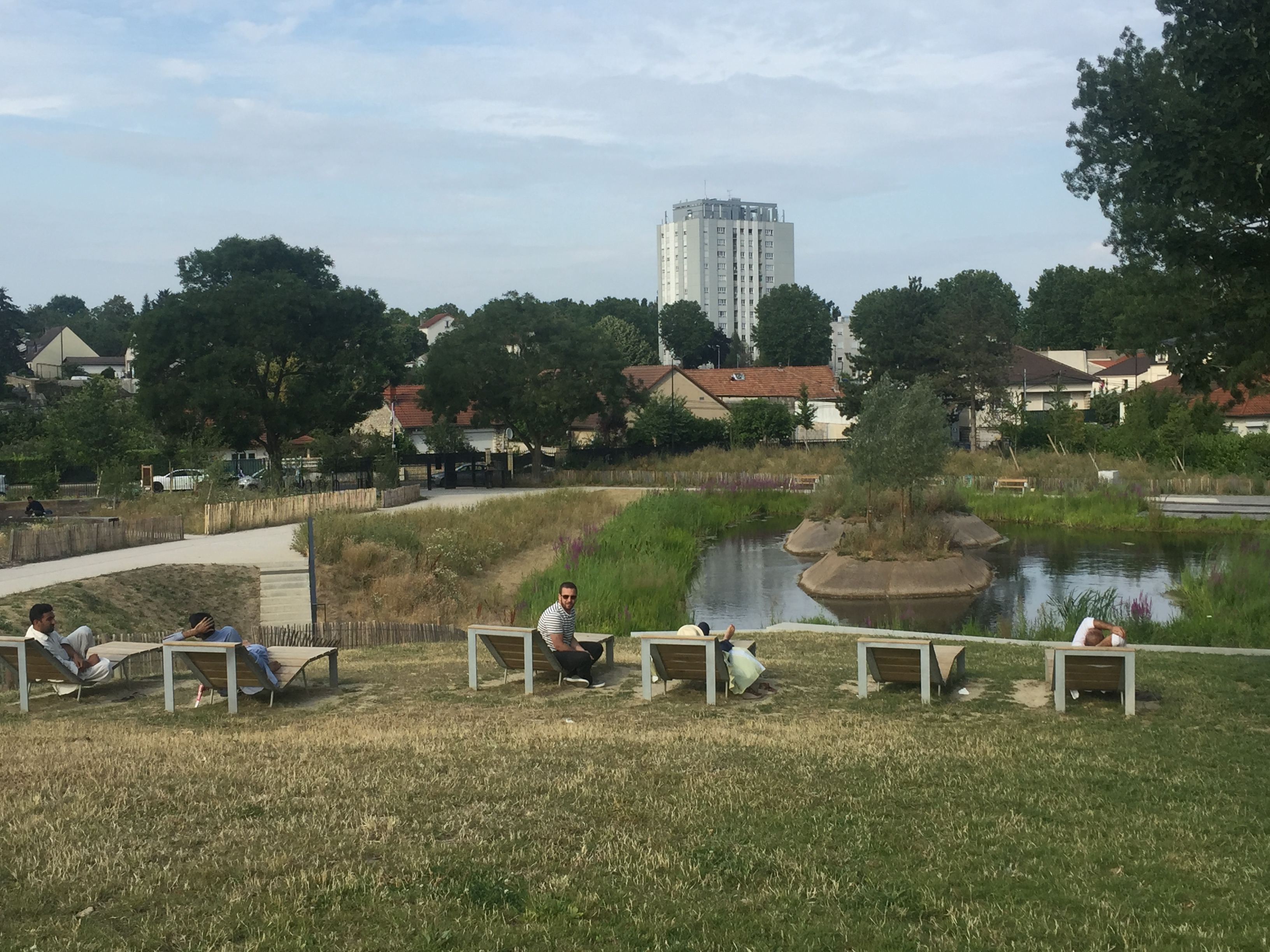 Vue partielle du parc de la République à Pierrefitte-sur-Seine (Seine-Saint-Denis). Côté rue Edouard Vaillant, on distingue une mare. Au loin la tour du 52-64 avenue Galliéni.